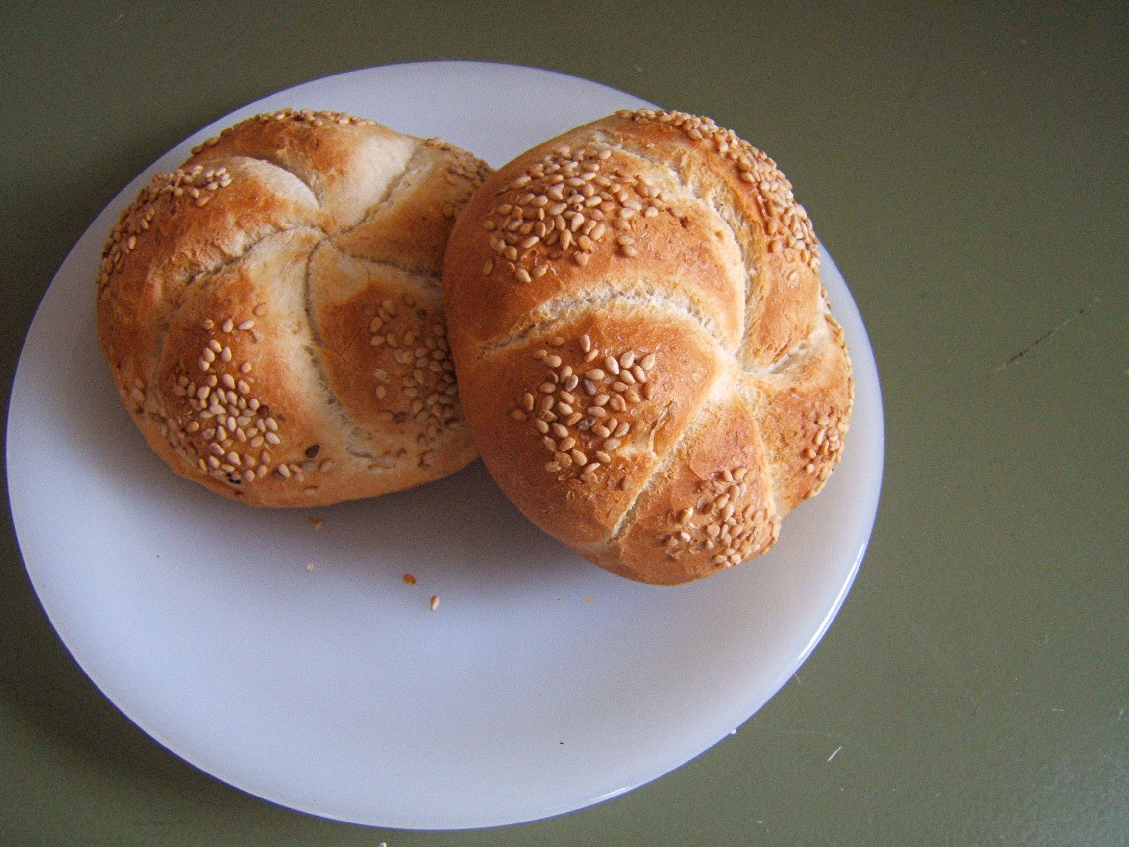 Kaiserbroodjes